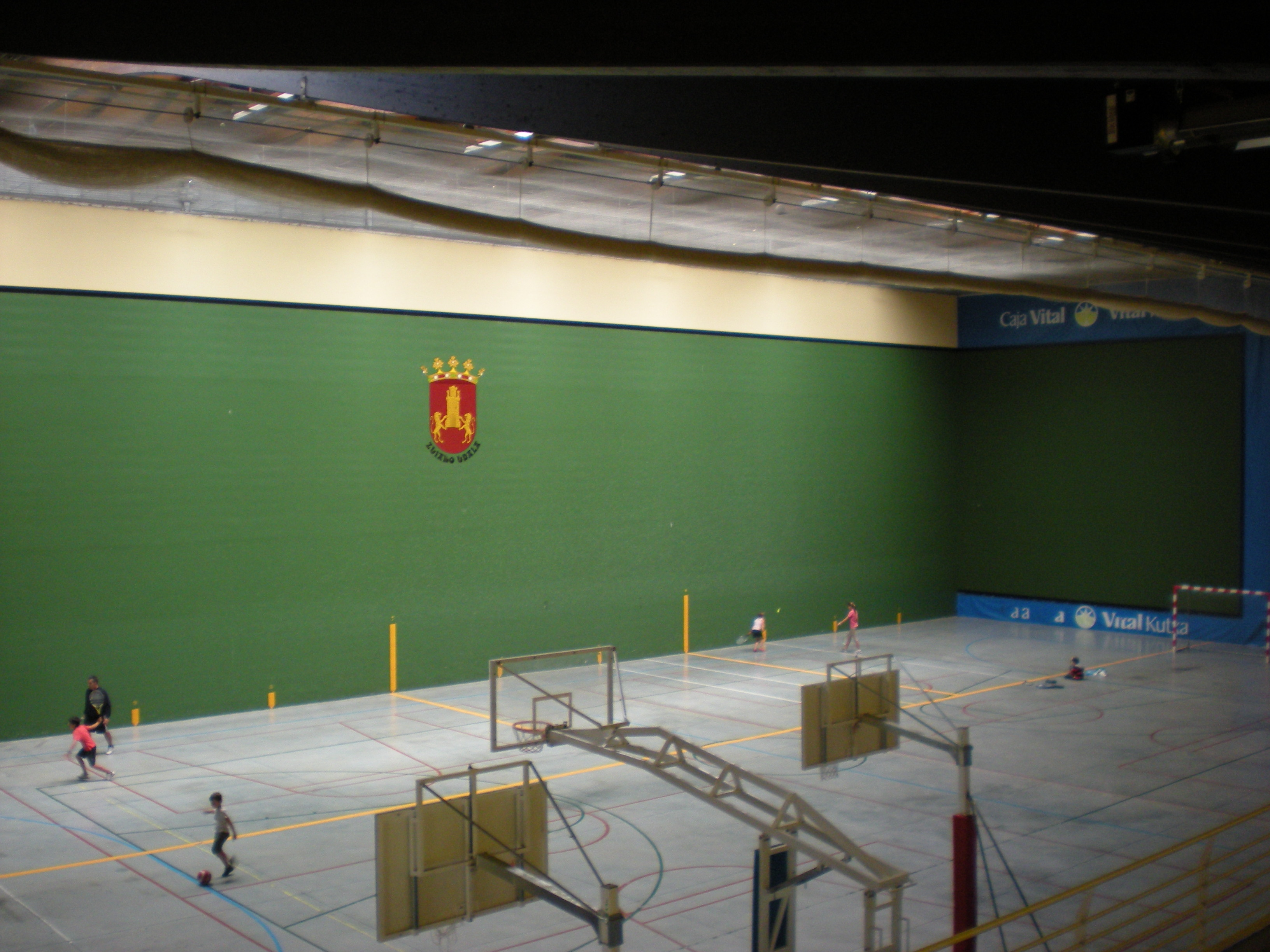 Zuiako udal pilotalekua